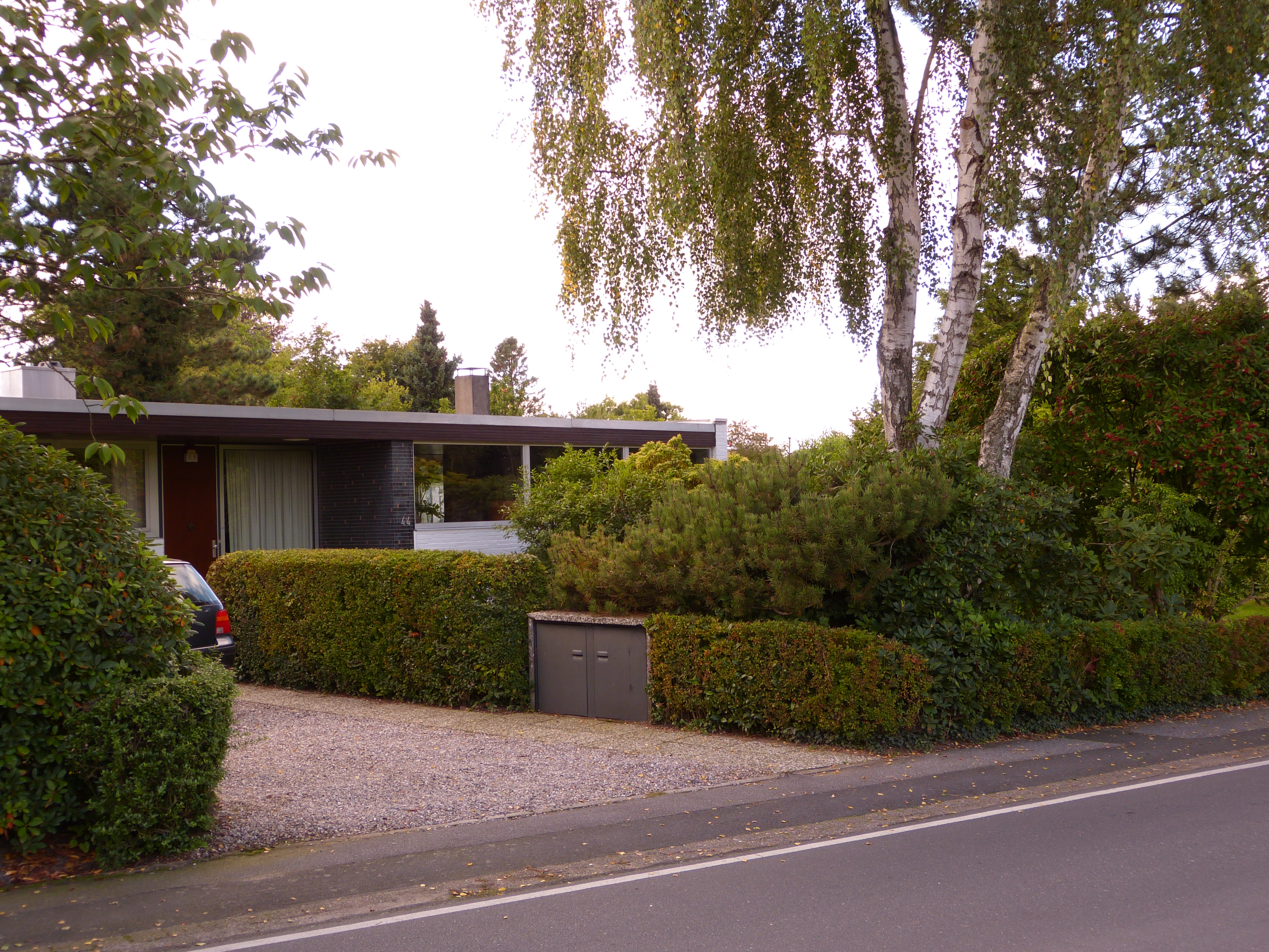 Das Bild zeigt ein Kulturdenkmal in Quickborn, Marienhöhe 44. Das Haus ist ein Teil der von dem Architekten Richard Neutra entworfenen Bewobau-Siedlung.